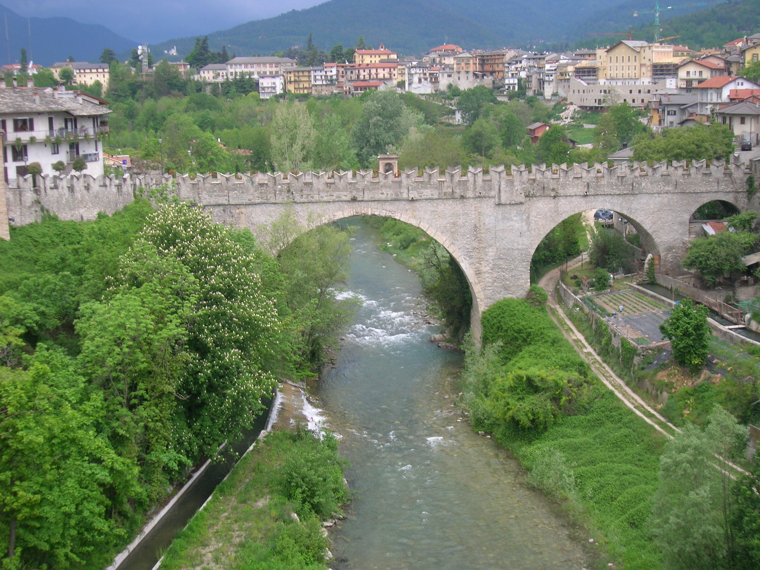 Dronero (ponte del Diavolo, sul fiume Maira) - Cuneo, Piemonte, Italy